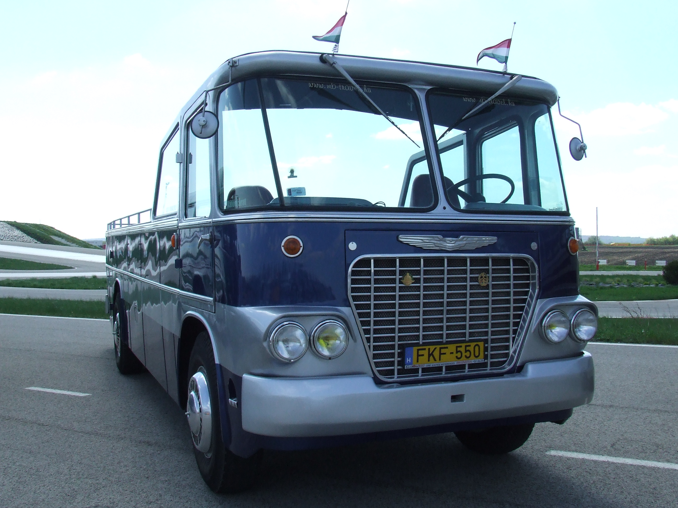 Busexpo 2016, Zsámbék